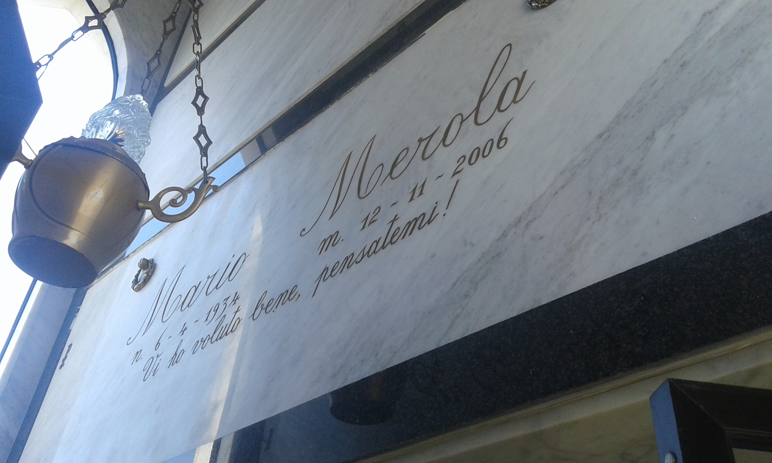 La Tomba di Mario Merola nella cappella privata di Gigi D'Alessio. Foto scattata da me il 9 luglio 2017 nel cimitero di Poggioreale a Napoli.